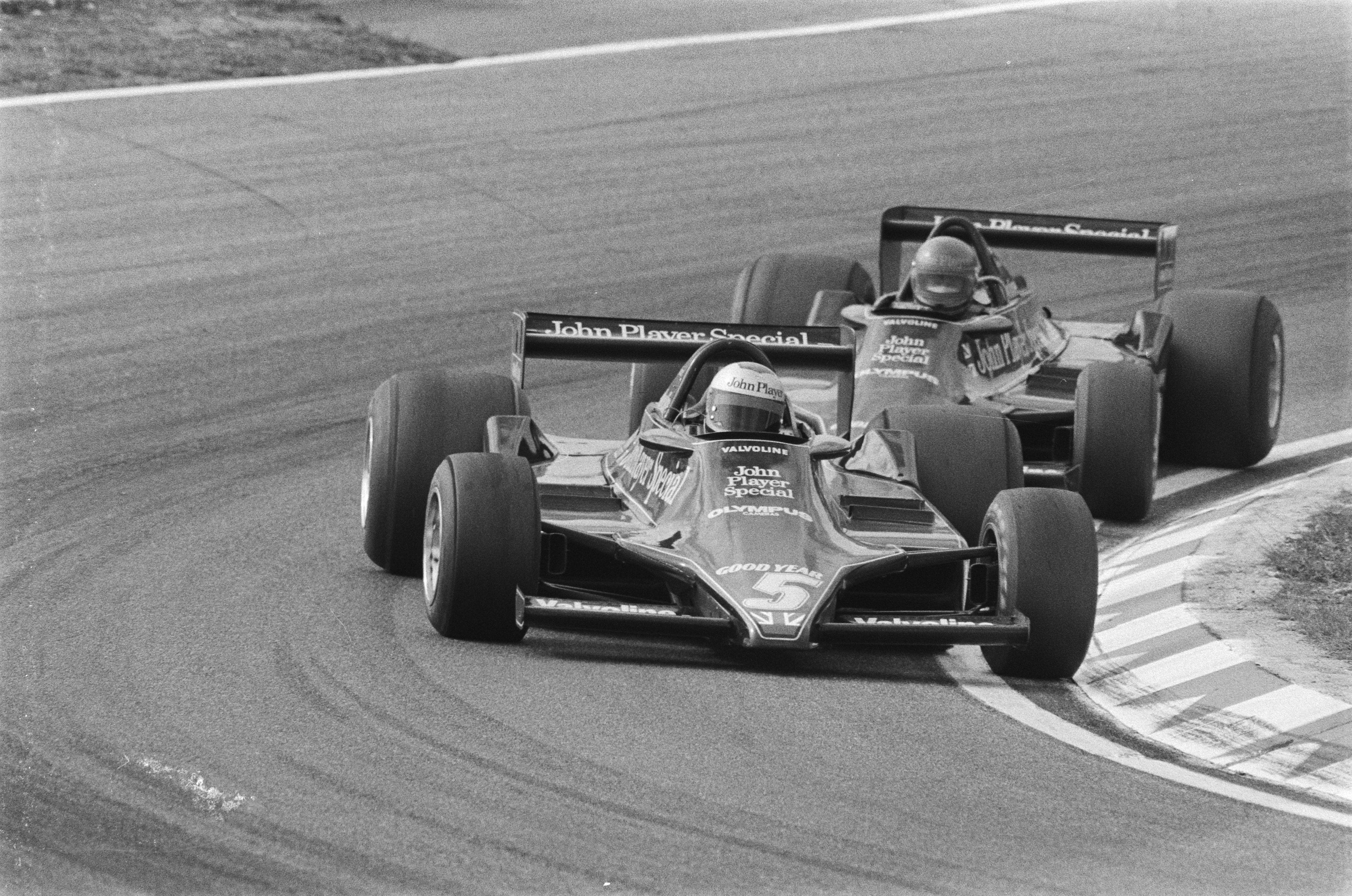 Collectie / Archief : Fotocollectie Anefo Reportage / Serie : [ onbekend ] Beschrijving : Grand Prix Zandvoort; Mario Andretti op kop met daar achter Ronnie Petterson Datum : 27 augustus 1978 Locatie : Noord-Holland, Zandvoort Trefwoorden : autoraces Fotograaf : Suyk, Koen / Anefo Auteursrechthebbende : Nationaal Archief Materiaalsoort : Negatief (zwart/wit) Nummer archiefinventaris : bekijk toegang 2.24.01.05 Bestanddeelnummer : 929-8743